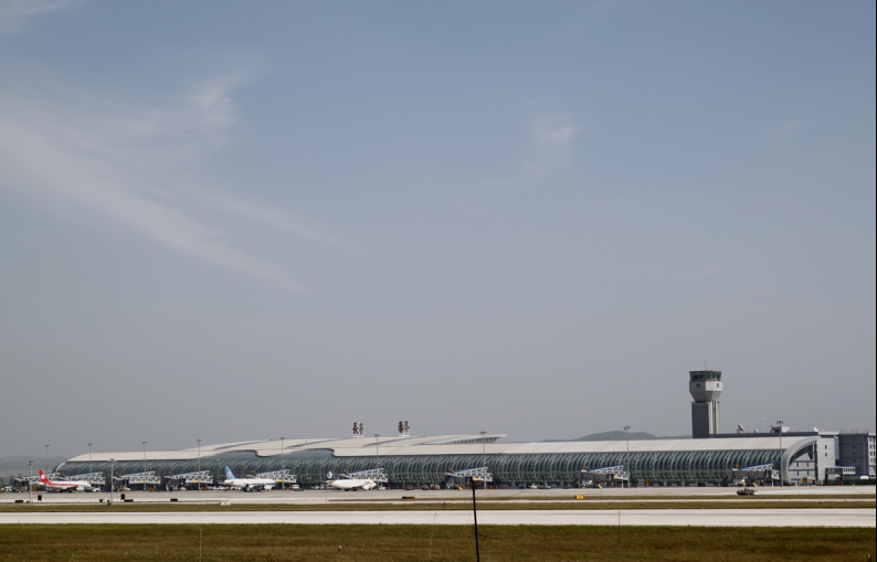 长春龙嘉国际机场1号航站楼及塔台全貌